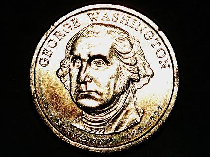 ജോർജ്ജ് വാഷിങ്ടന്റെ ഓർമ്മയ്ക്കായി പുറത്തിറക്കിയ പ്രസിഡൻഷ്യൽ ഡോളർ നാണയം